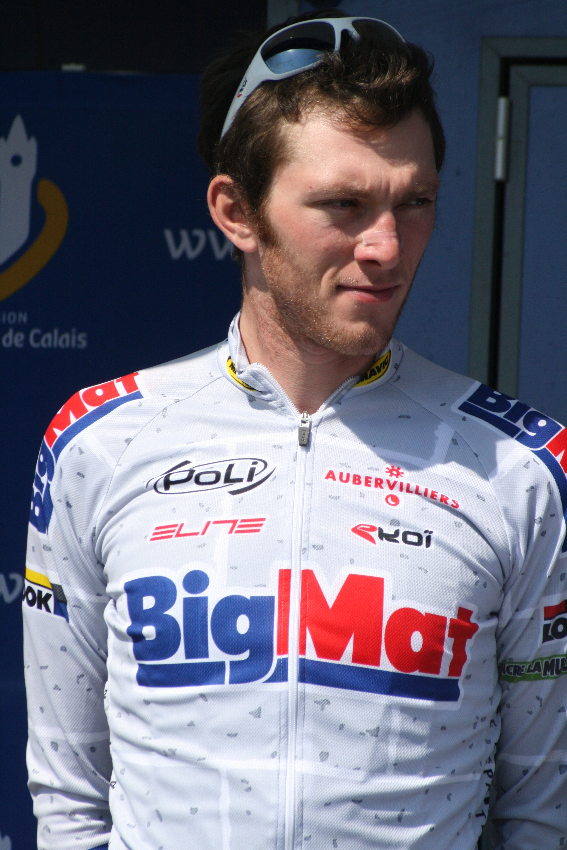 Présentation des coureurs au départ de la première étape Romain Bacon